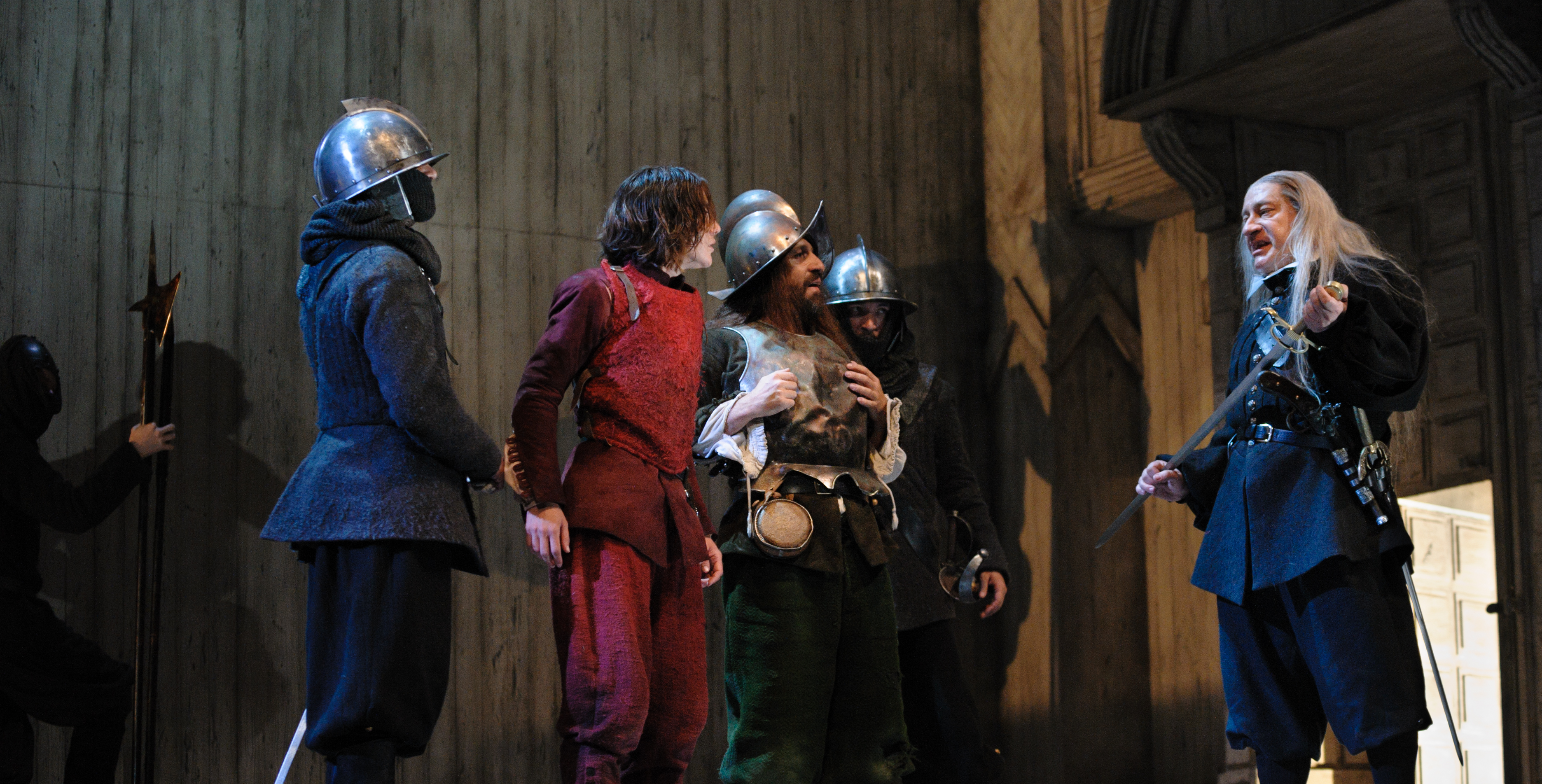 La vida es sueño. 35 edición del Festival de Teatro Clásico de Almagro. Datos de la obra Título: La vida es sueño Autor: Calderón de la Barca Versión: Juan Mayorga Dirección: Helena Pimenta Cía: Compañía Nacional de Teatro Clásico Foto: Guillermo Casas